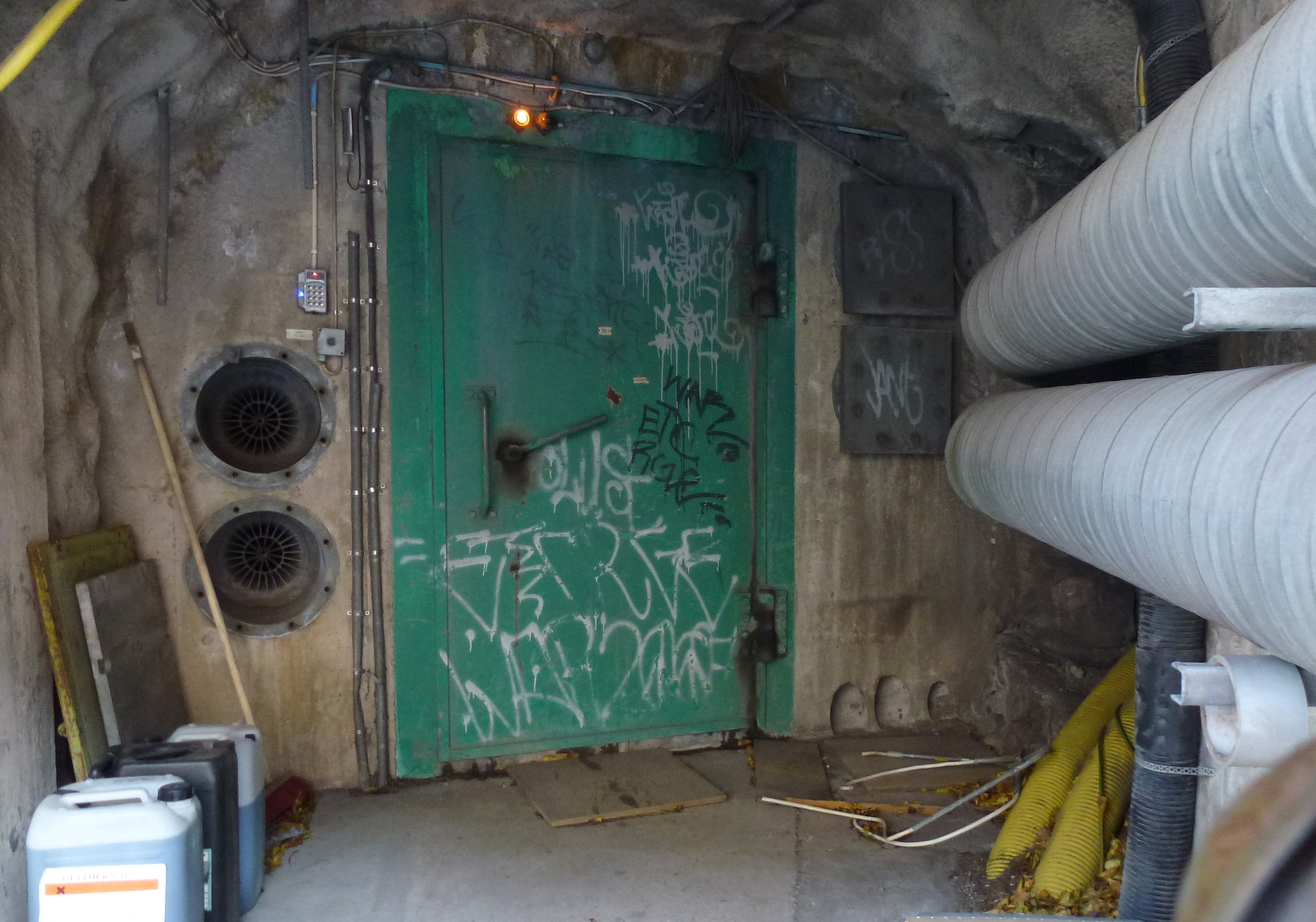 Pionen, tidigare skyddsrum och ledningscentral, numera plats för Bahnhofs datahall